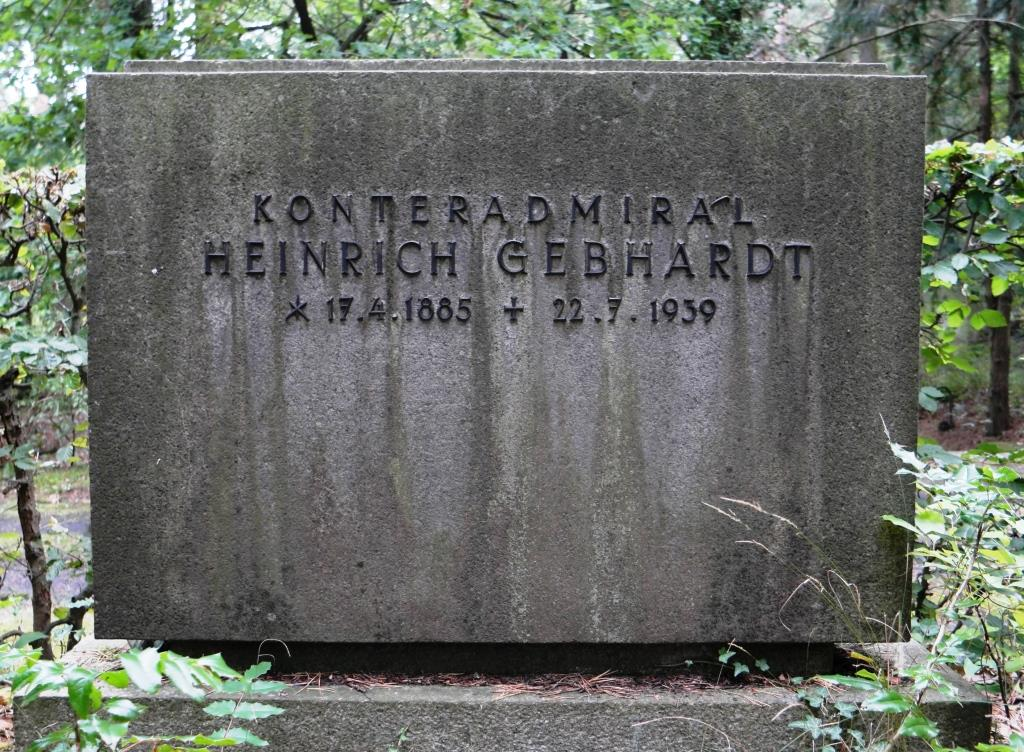 Grab des Marineoffiziers Heinrich Gebhardt (1885-1939) auf dem Südwestkirchhof in Stahnsdorf